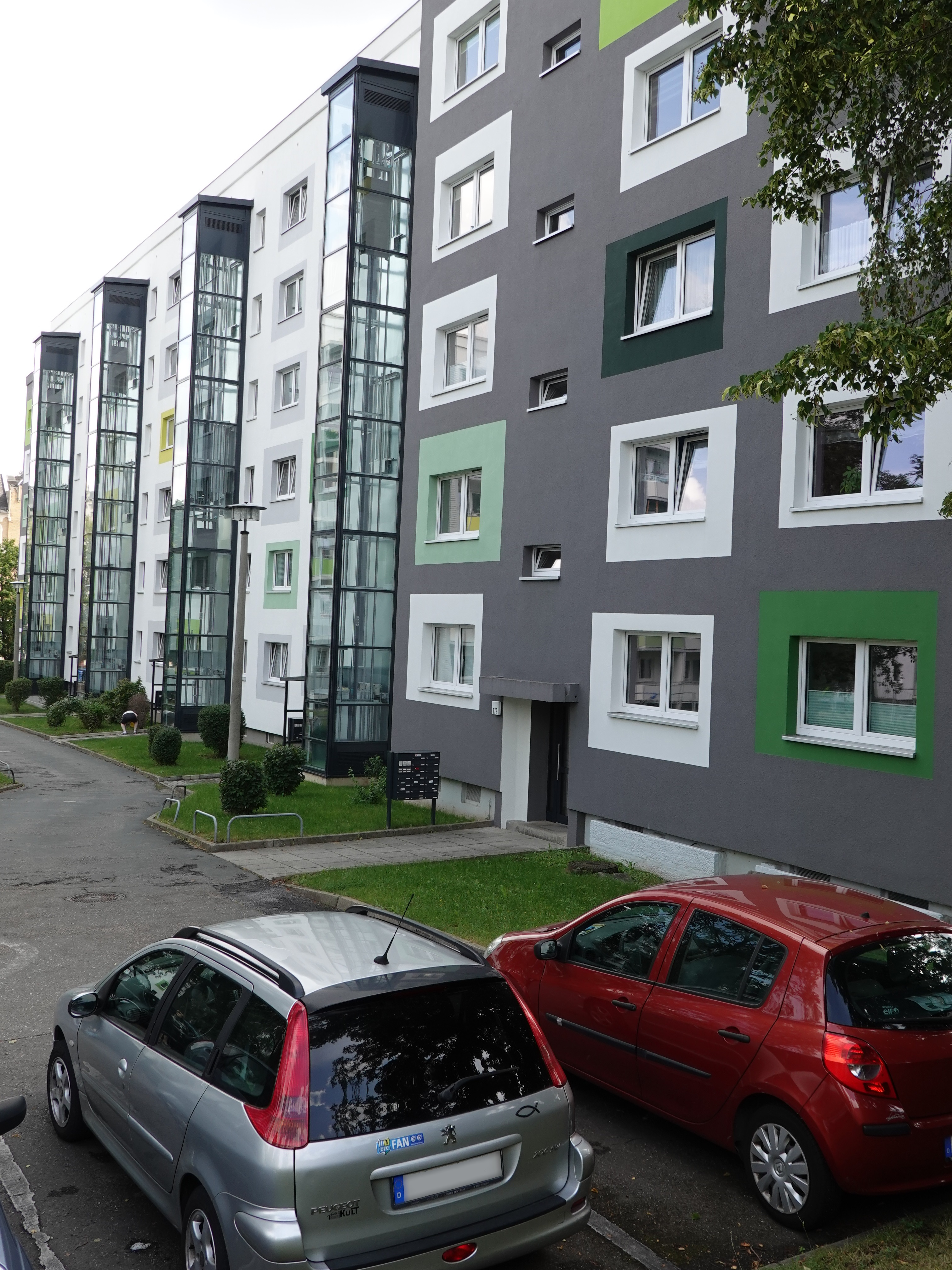 Modernisierter Plattenbau WBS 70 in Chemnitz, 18.08.2020